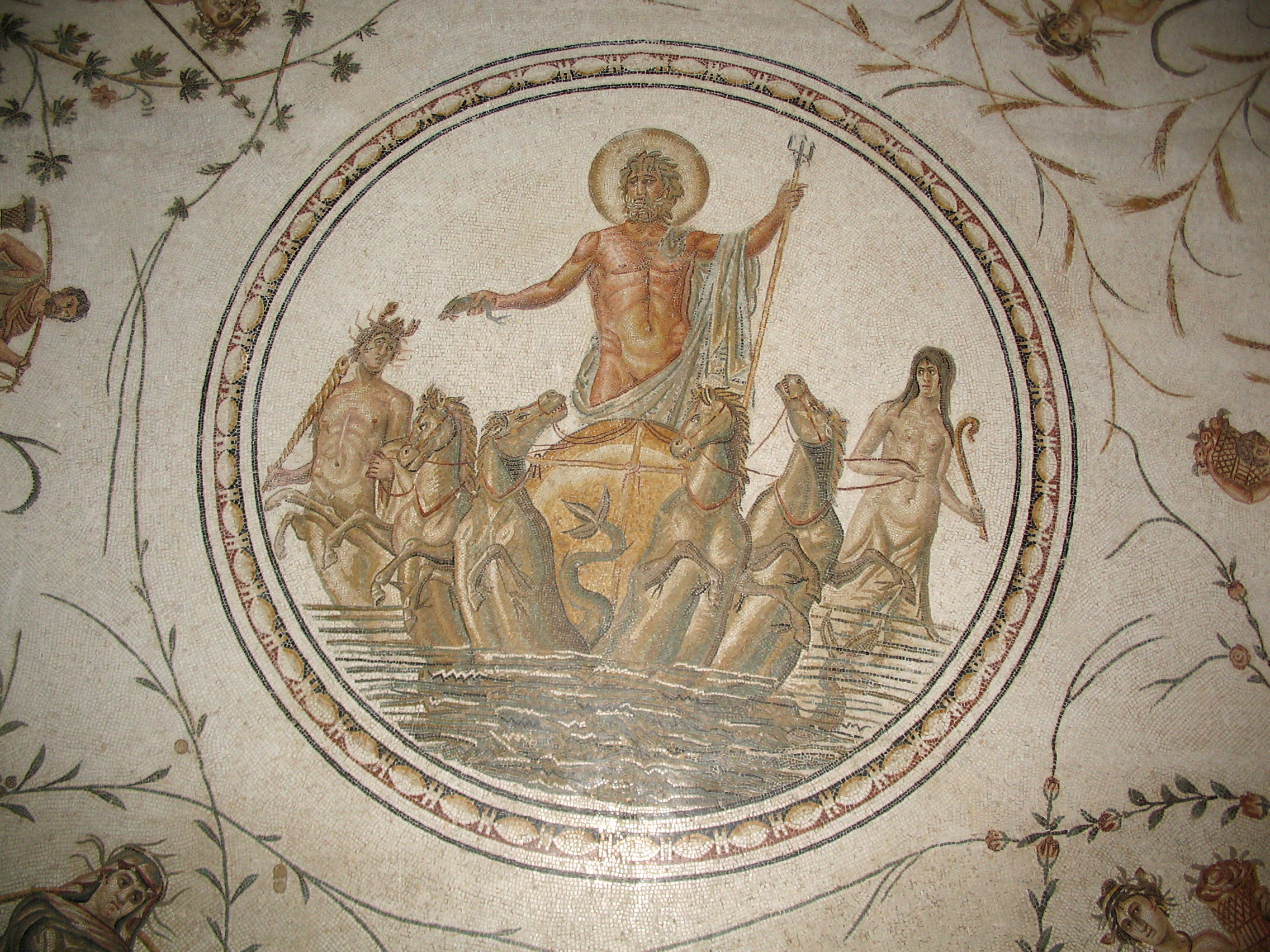 Mosaico romano, trionfo di Nettuno, III sec, Museo nazionale del Bardo,Tunisi.